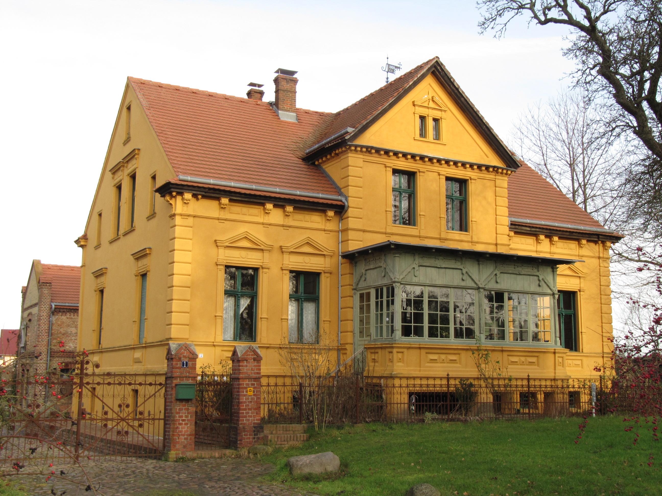 radewege dorfstraße 1